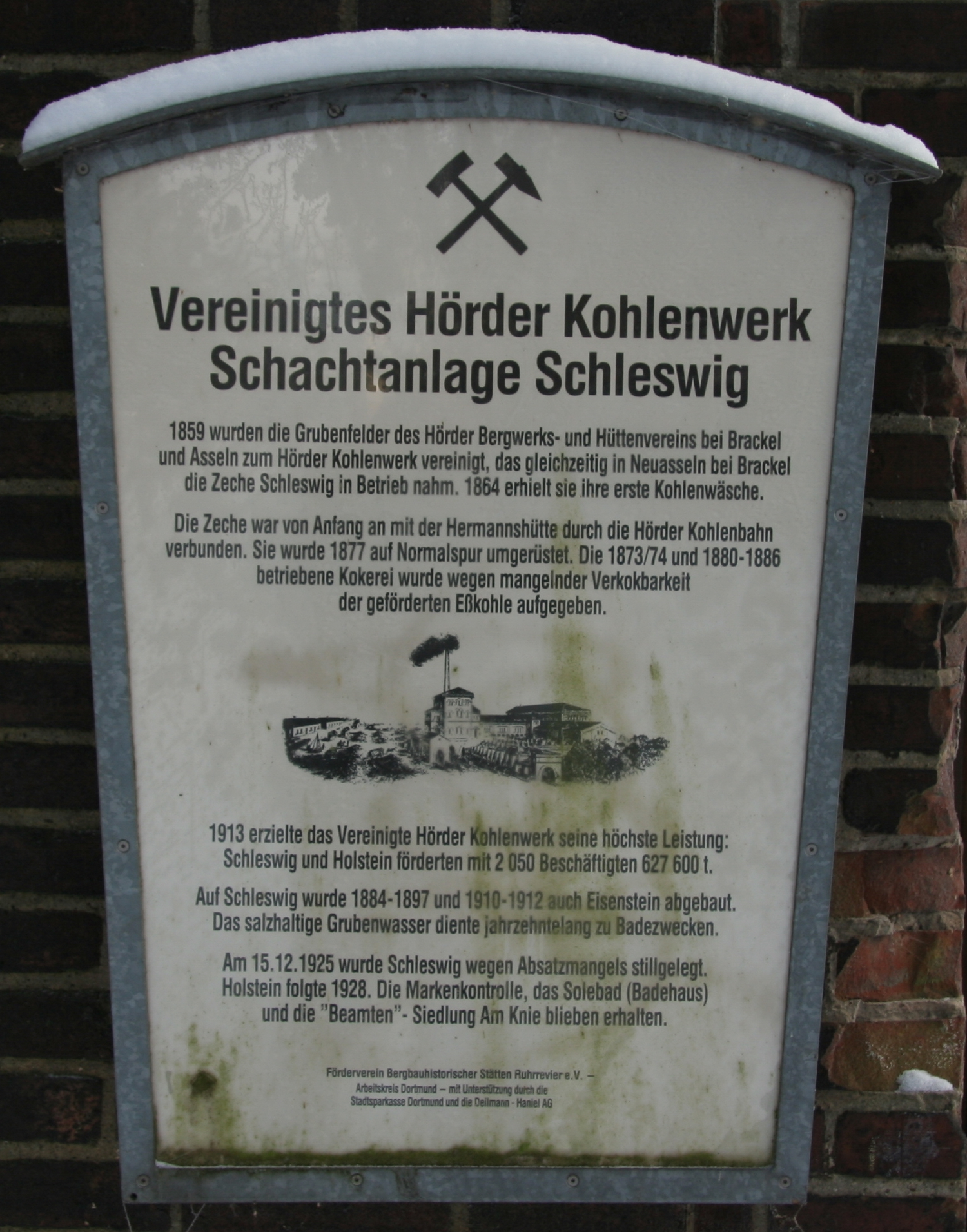 Dortmund, Zeche Schleswig, Gedenktafel an der ehemaligen Pforte